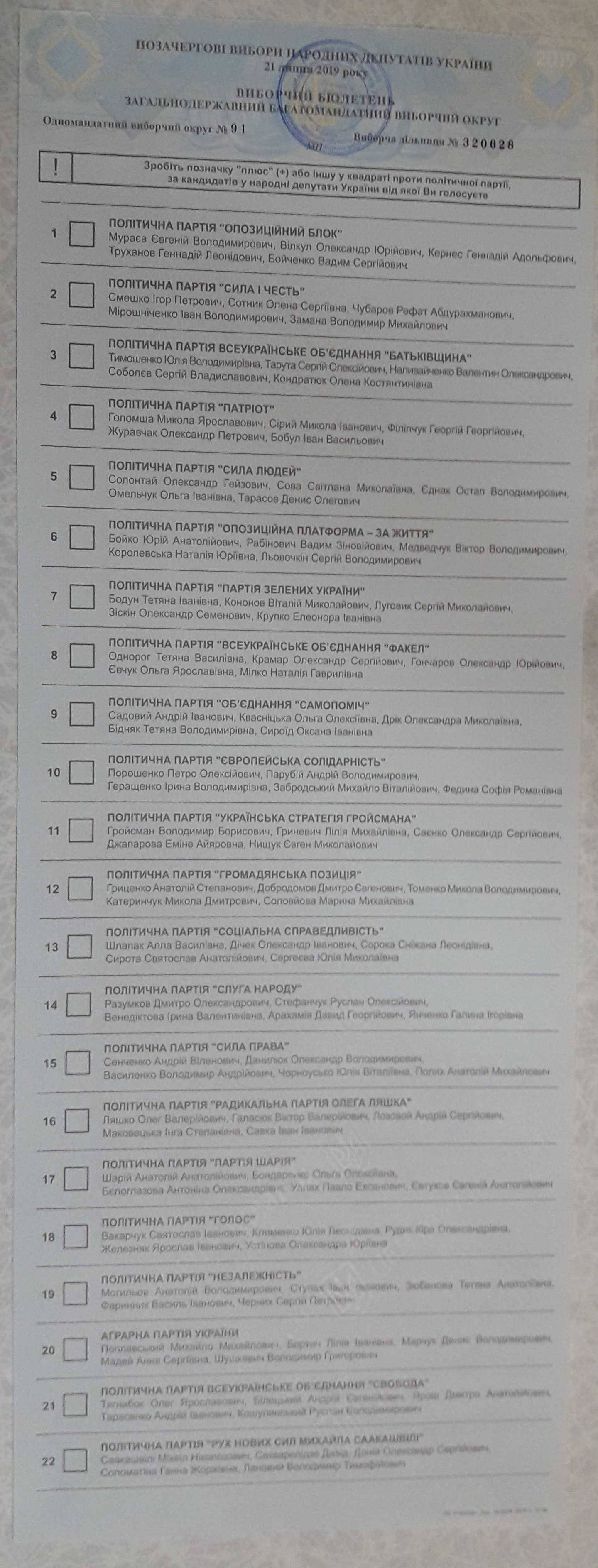 Бюлетень на парламентських виборах (багатомандатний округ)